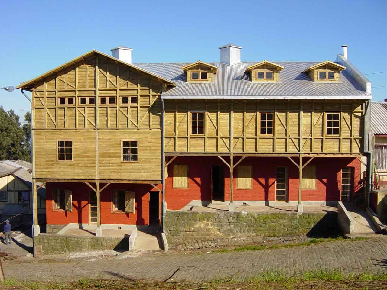 Frontis Actual Pabellón 83 This is a photo of a national monument in Chile: 2135